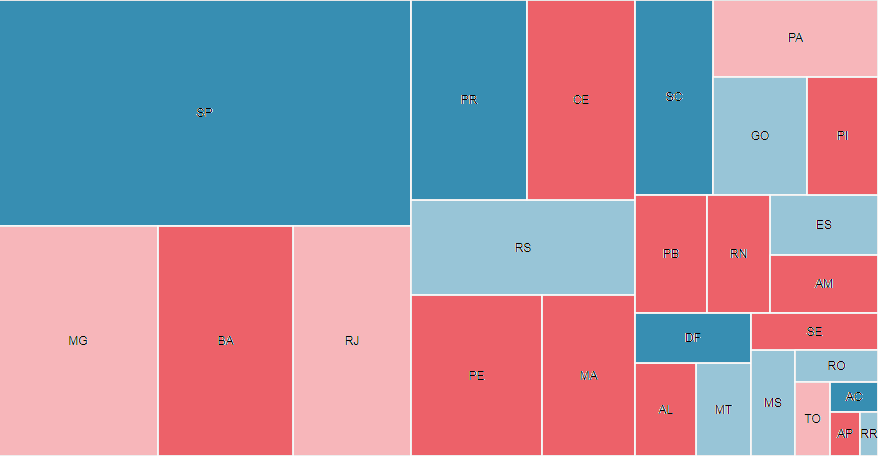 Treemap da eleição presidencial no Brasil em 2014.